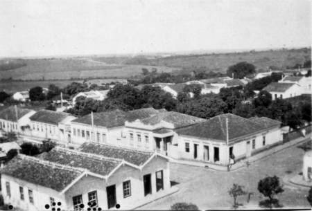 Vista aérea do centro da cidade de Santa Bárbara d'Oeste, São Paulo, Brasil